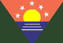 Bandera del municipio Páez. Estado Miranda. Venezuela